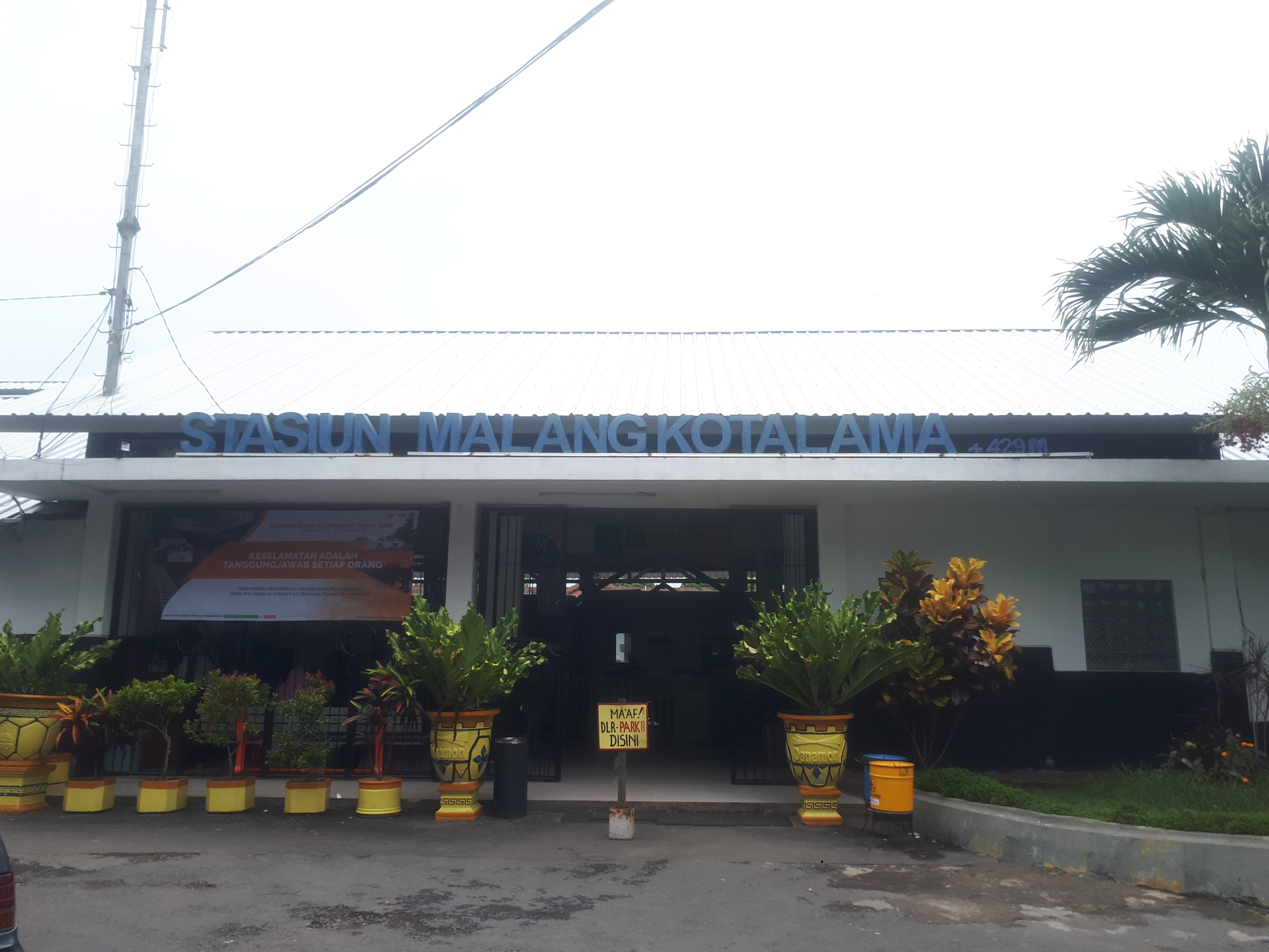 Tampak depan Stasiun Malang Kotalama tahun 2020